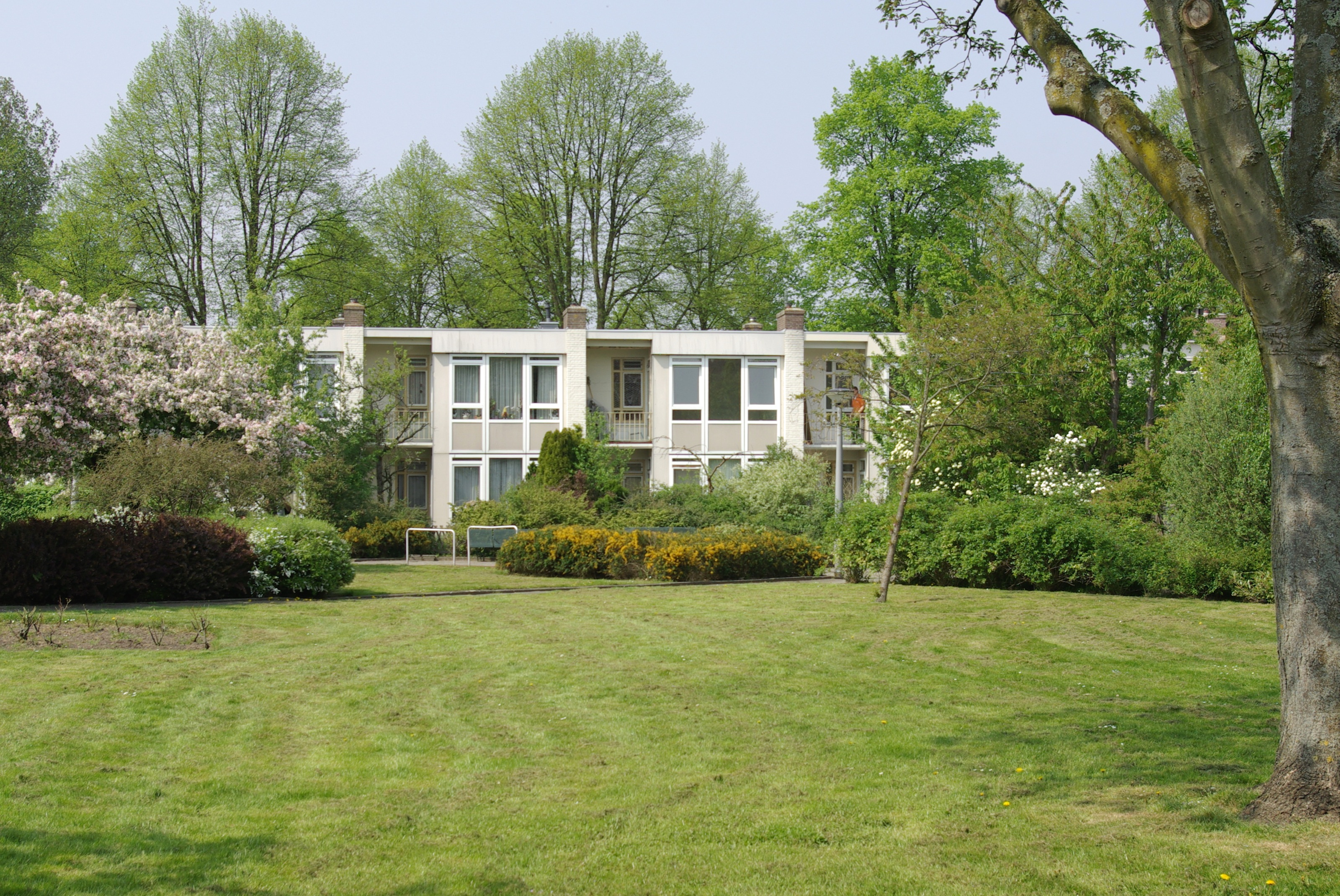 De wijk Jeruzalem in Amsterdam-Oost. De stedenbouwkundigen en architecten Cornelis van Eesteren, J.H. Mulder, B. Merkelbach, Ch.J.F. Karsten, Piet Elling en M. Stam zijn de ontwerpers. De woningen zijn gebouwd tussen 1950 en 1954. Na voordracht in 2007 via de lijst van rijksmonumenten uit de periode 1940-1958, opgesteld door Ronald Plasterk, werd de wijk Frankendaal/Jeruzalem erkend als rijksmonument.